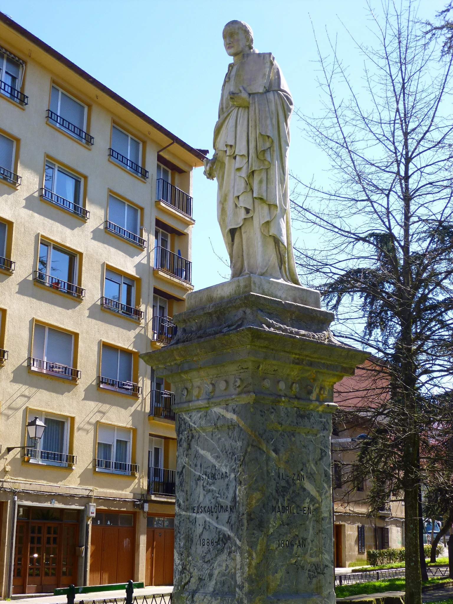 Durango (Vizcaya)